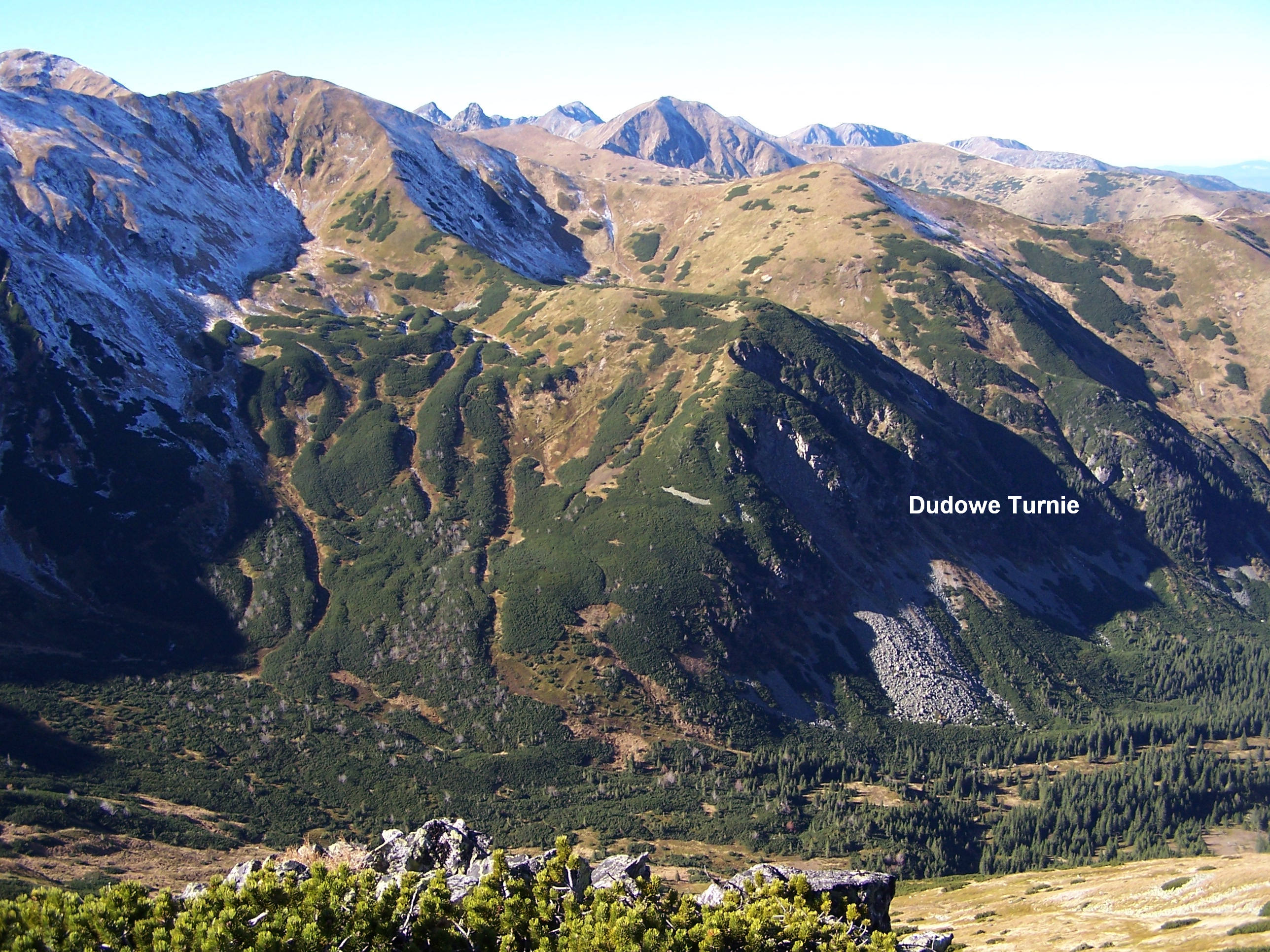 Dolina Starorobociańska (Tatry Zachodnie). Kończysty Wierch, Czubik, Dudowa Kotlina, Dudowe Turnie